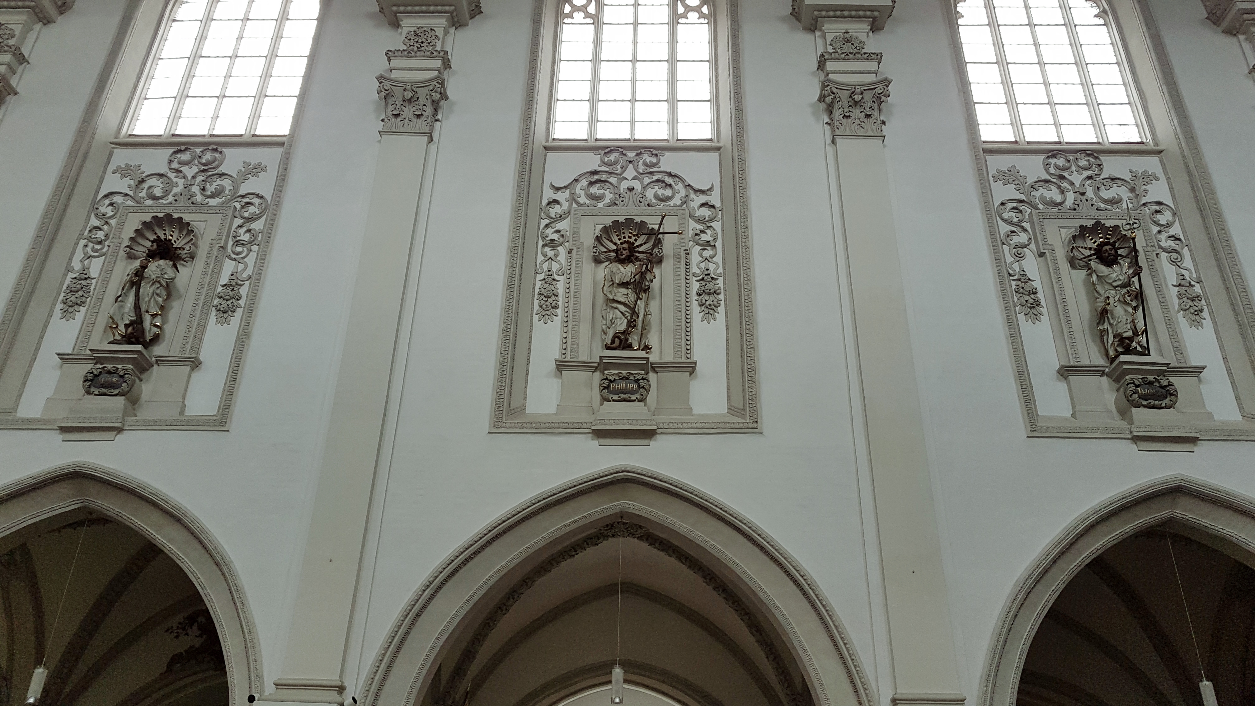 Mariä Himmelfahrt (Landsberg am Lech), Apostelfiguren an der Mittelschiff-Hochwand v. Lorenz Luidl.